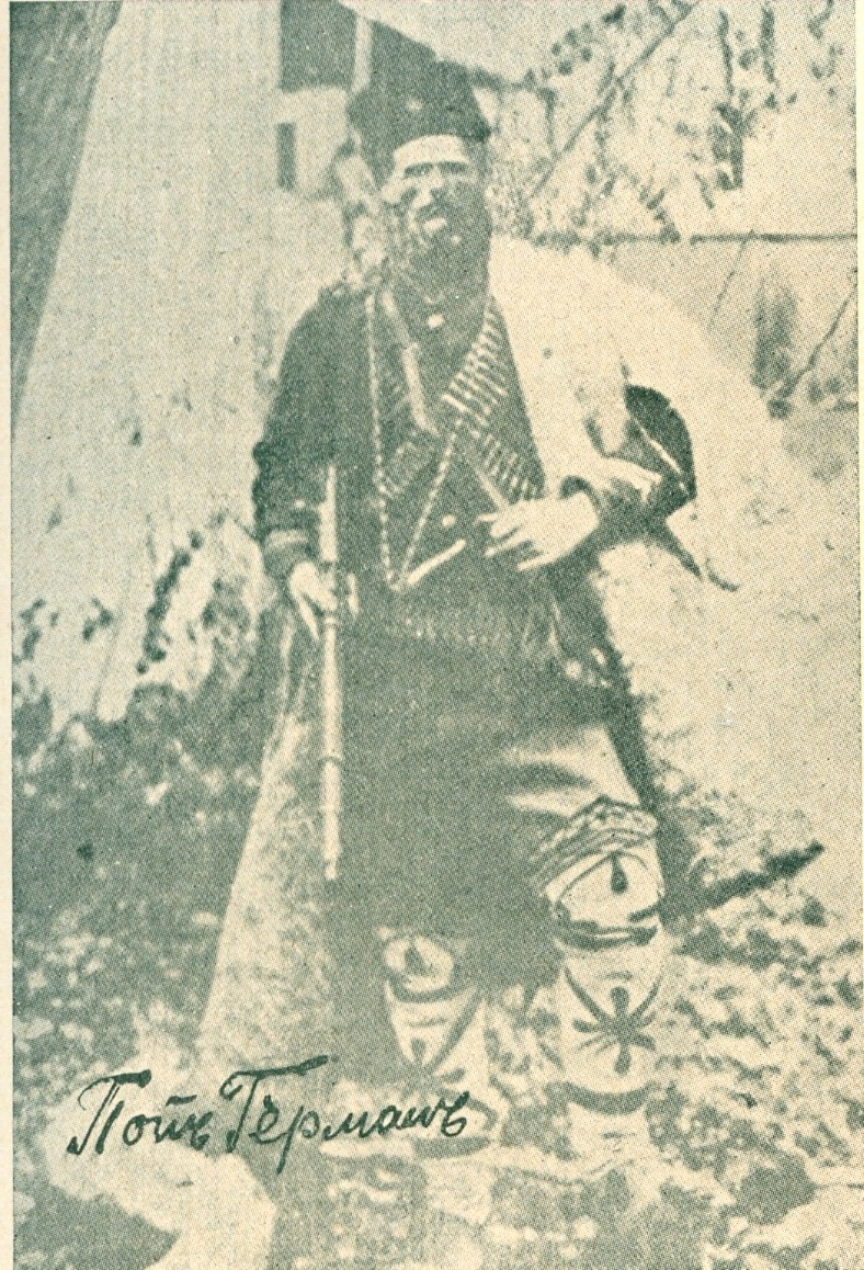 Снимка на поп Герман, български свещеник и революционер от с. Черешница, Костурско.